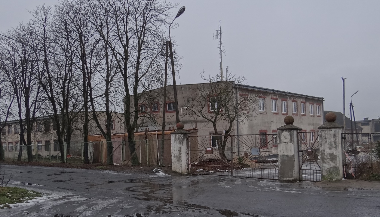 Garnizon Stargard. Były koszary jednostki w Witkowie